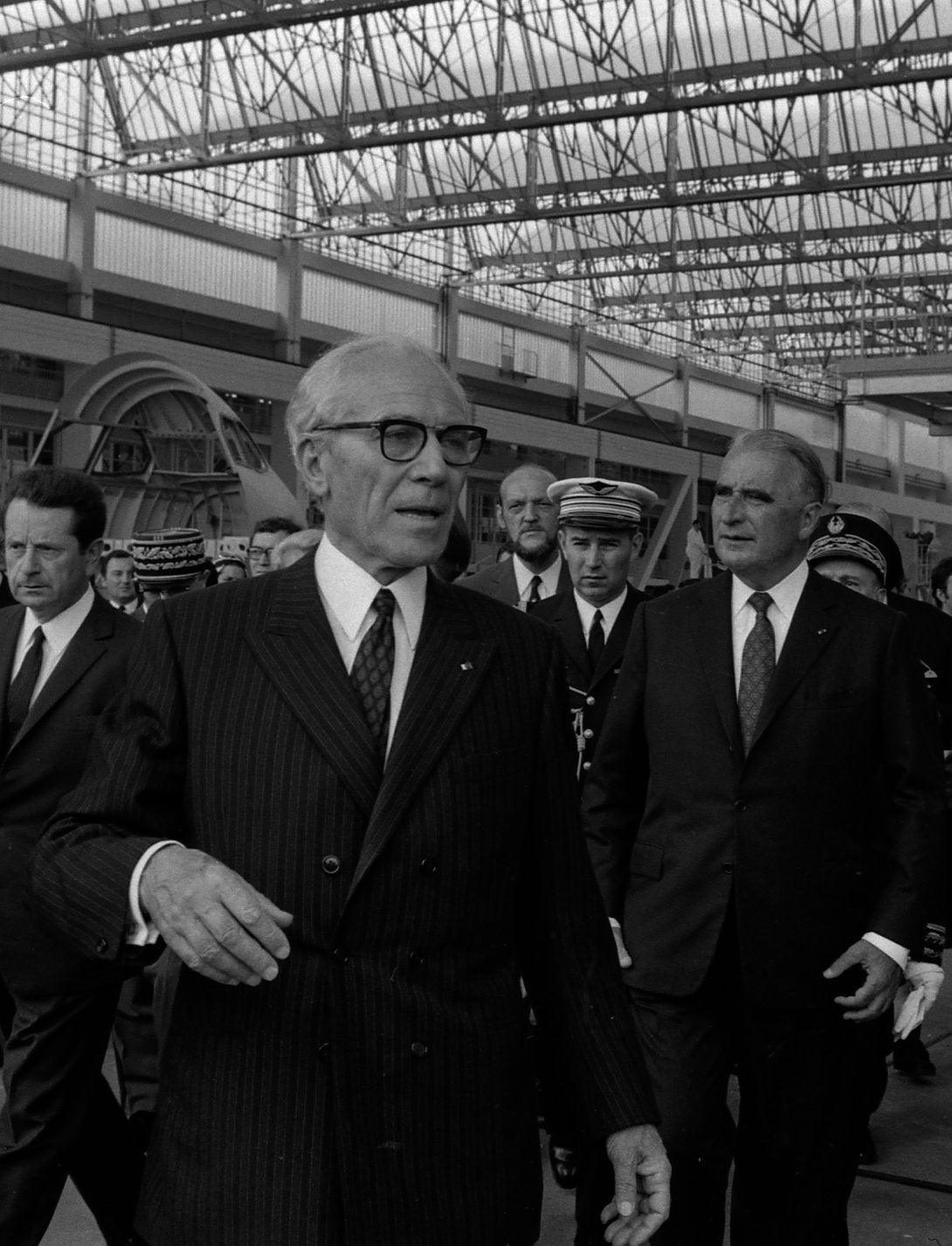 Usine aéronautique de la Société nationale industrielle aérospatiale (SNIAS) de Saint-Martin-du-Touch. 7 mai 1971. Vue de Georges Pompidou, Président de la république et de Henri Ziegler, président de la SNIAS et d'un groupe d'officiels dans un hangar d'assemblage d'avions, à l'occasion du voyage présidentiel à Toulouse.